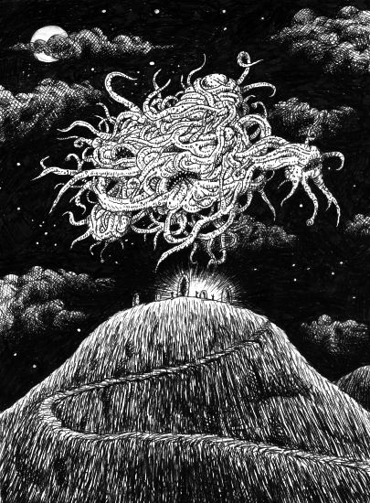 Vision d'artiste de Yog-Sothoth en noir et blanc.